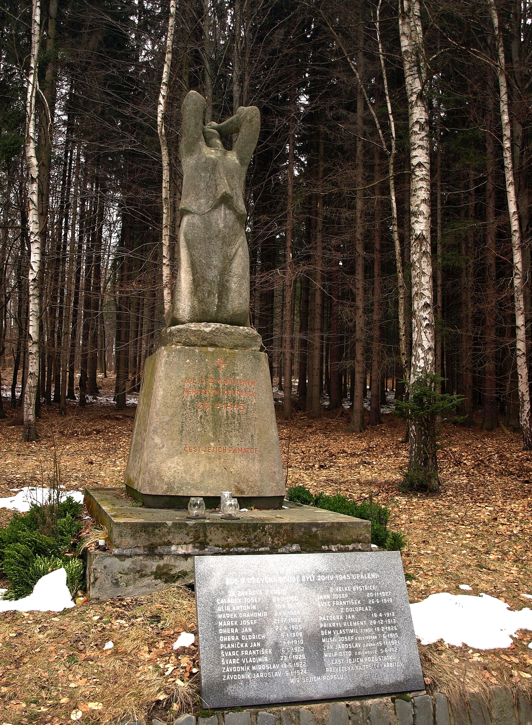 Pomník Zákřovský Žalov (Kozlov), les - polesí Kyjanice, Kozlov